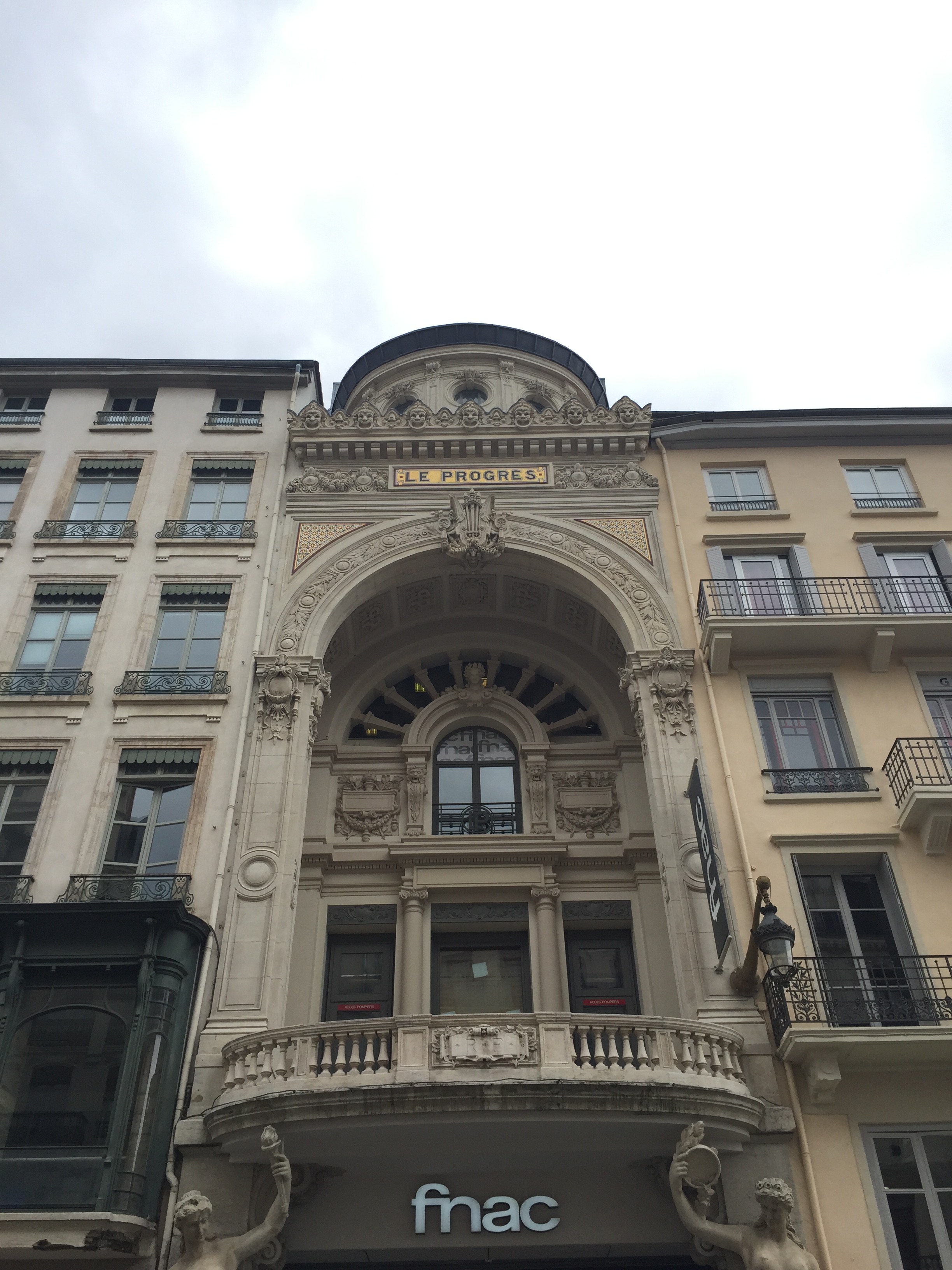 Ancien siège du Progrès de Lyon - Fnac.